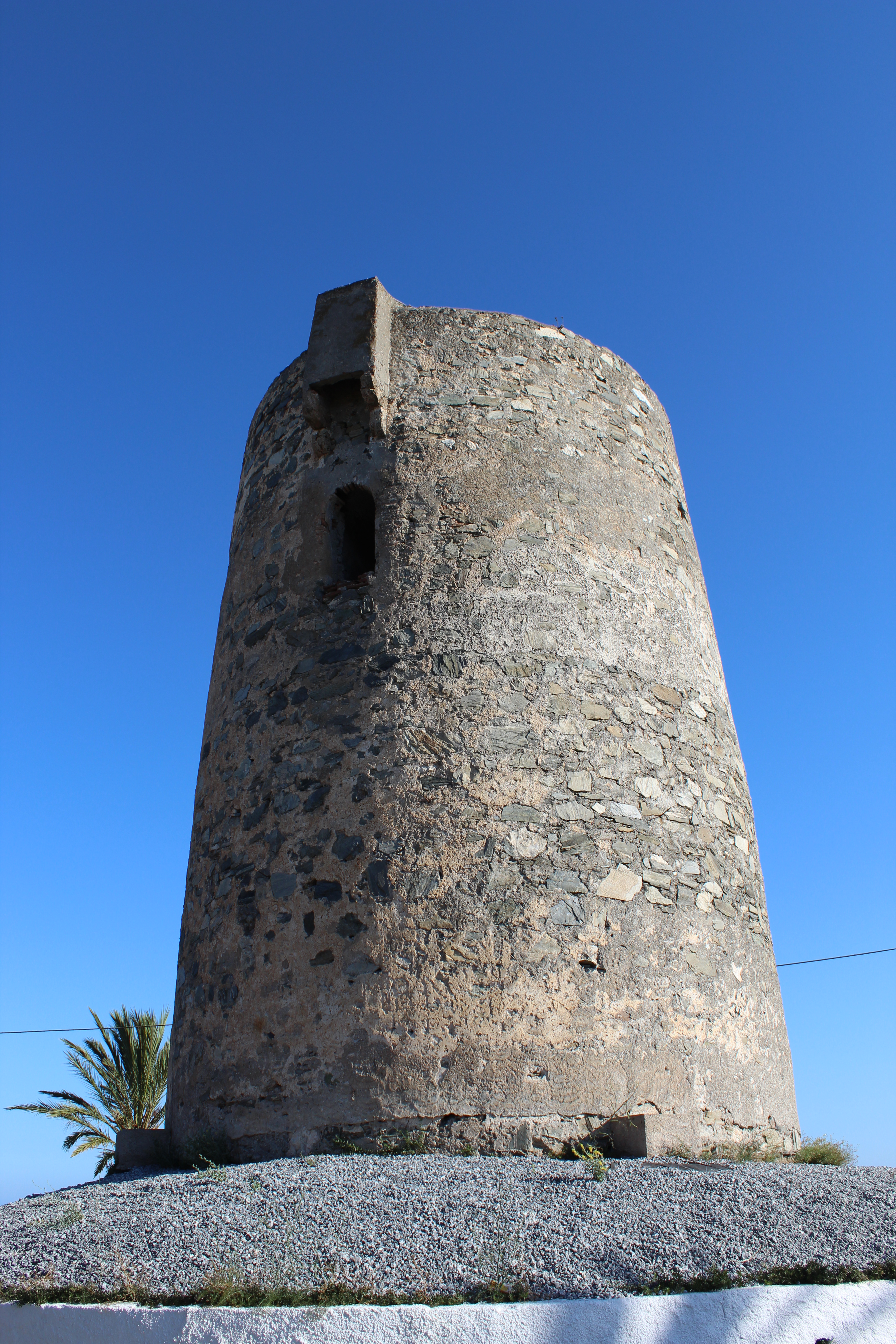 Torre de Velilla, en la costa de Almuñécar.